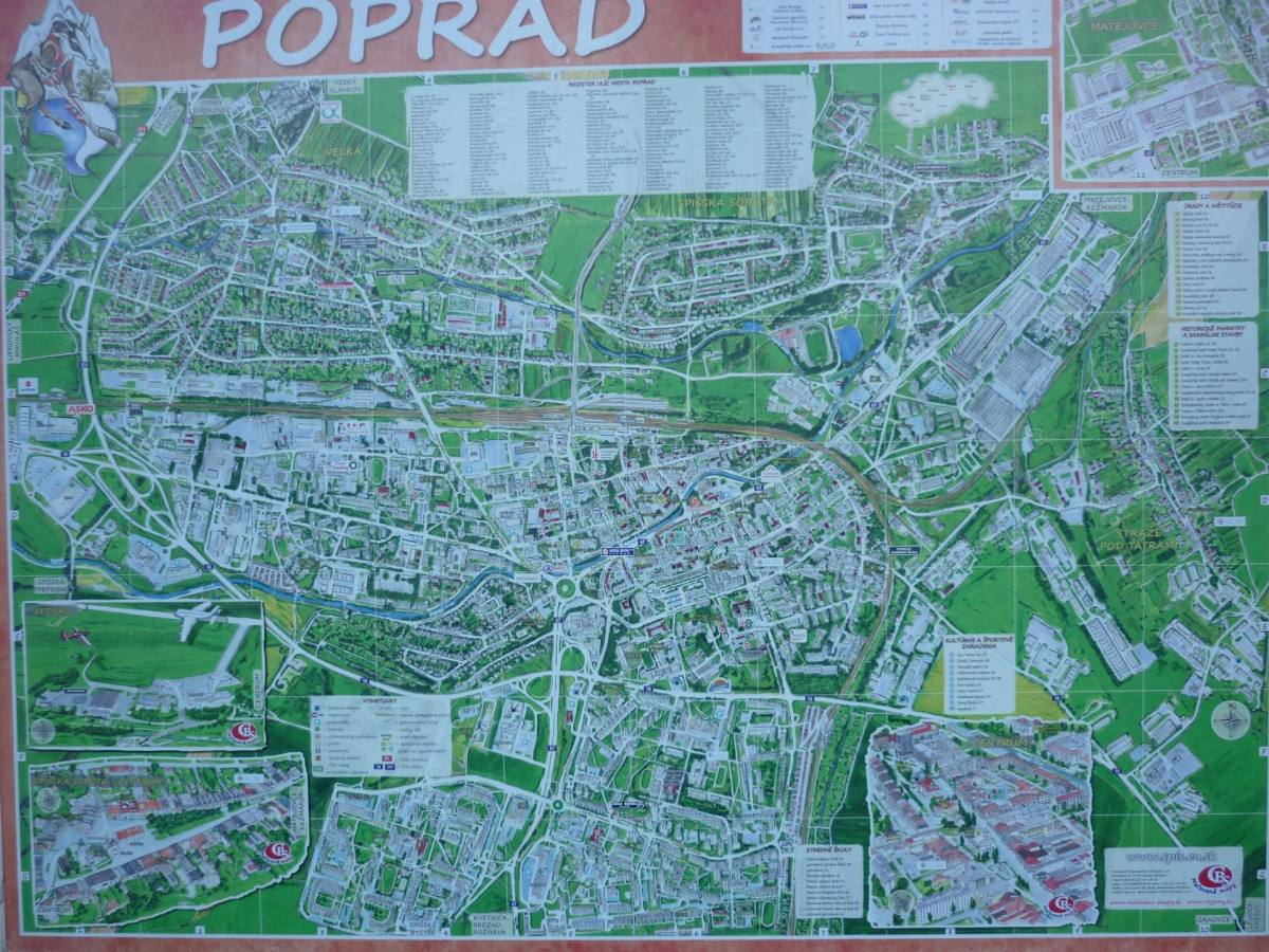 Spišská Sobota - Slovensko